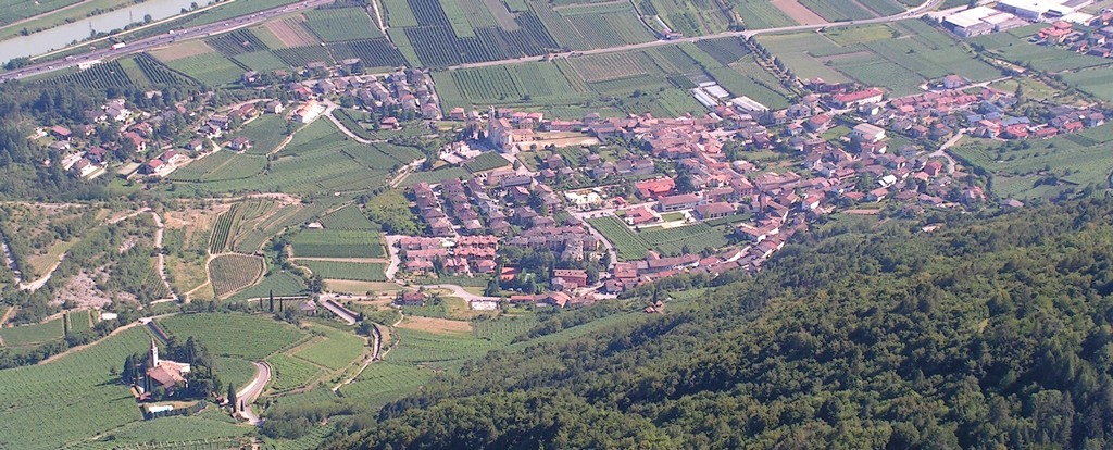 Mirko Gasperotti, opera propria, Pomarolo (provincia di Trento) da Cimana dei Presani, pubblico dominio